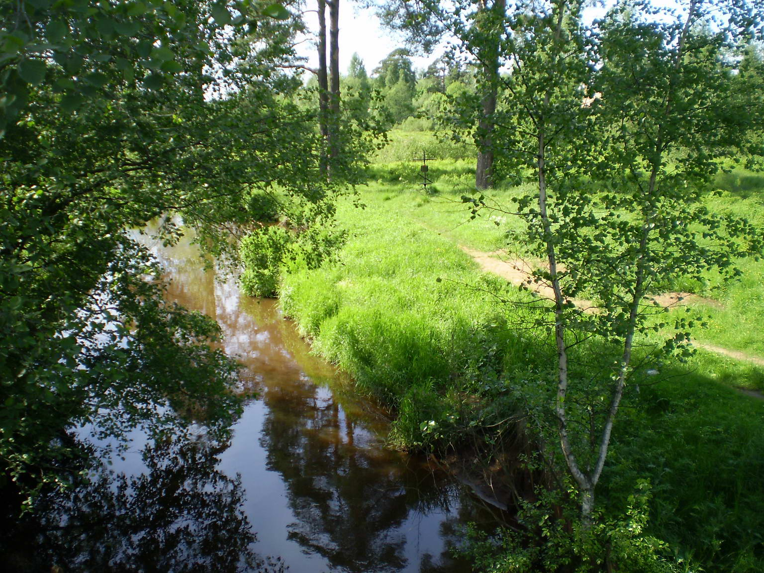 Всеволожск. Предполагаемое место гибели поэта Н. Гумилёва